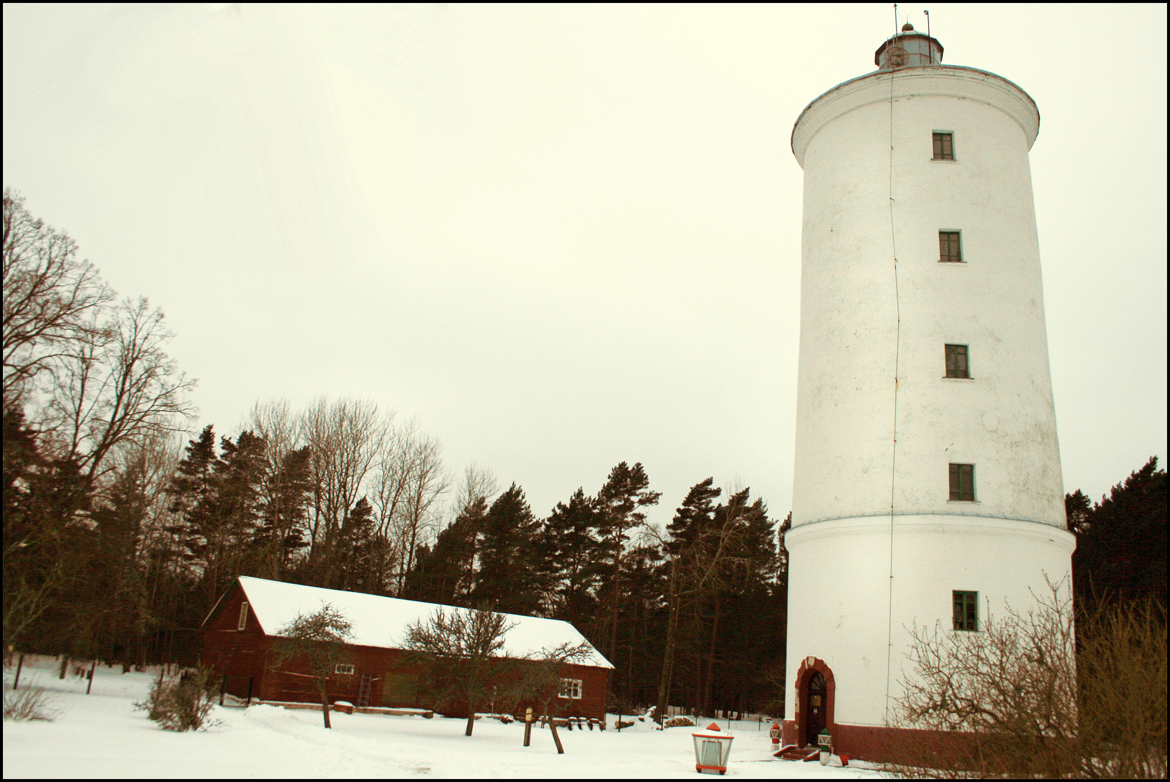 Ovīšbāka lighthouse